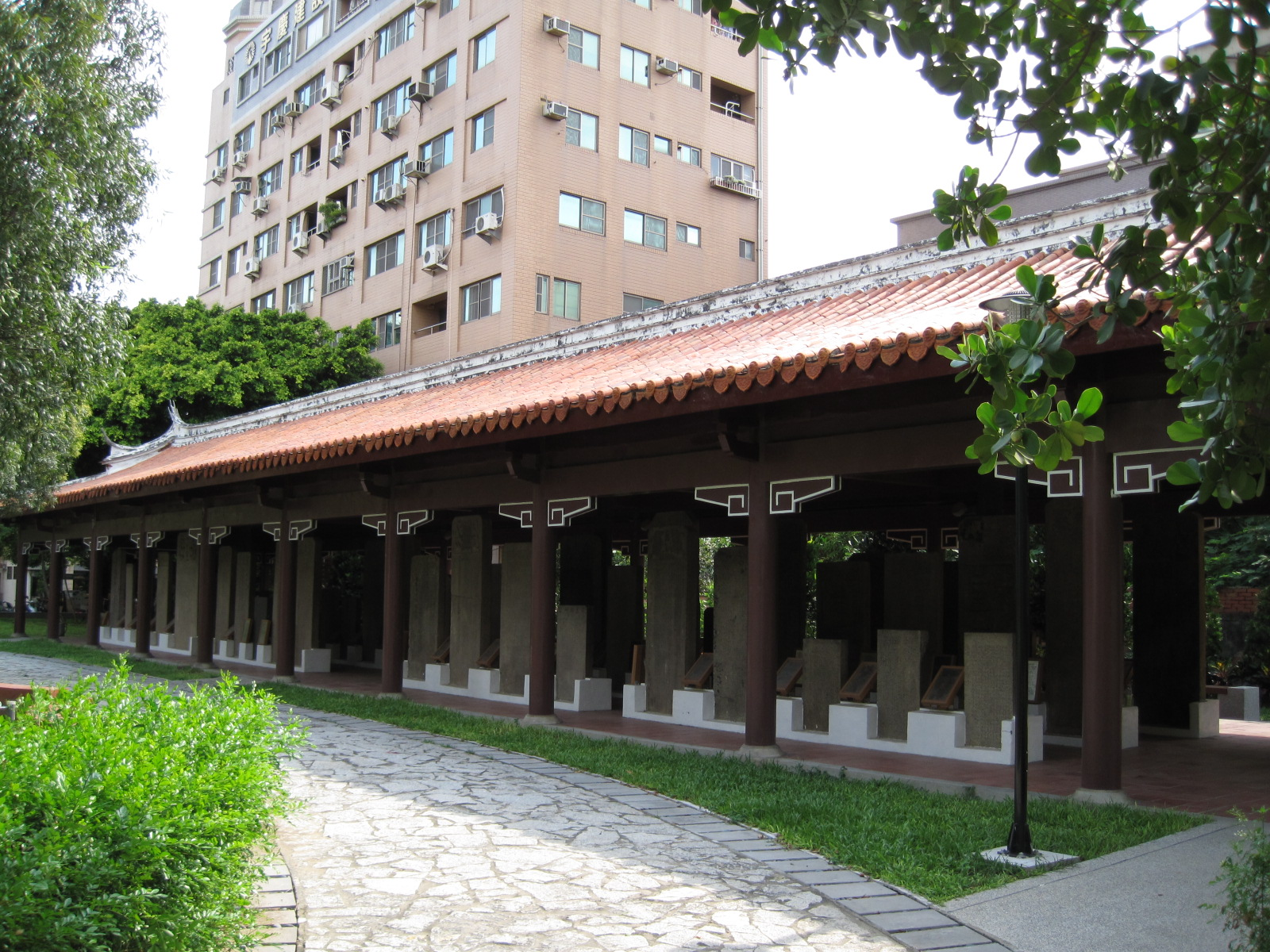 臺灣臺南市南門公園碑林